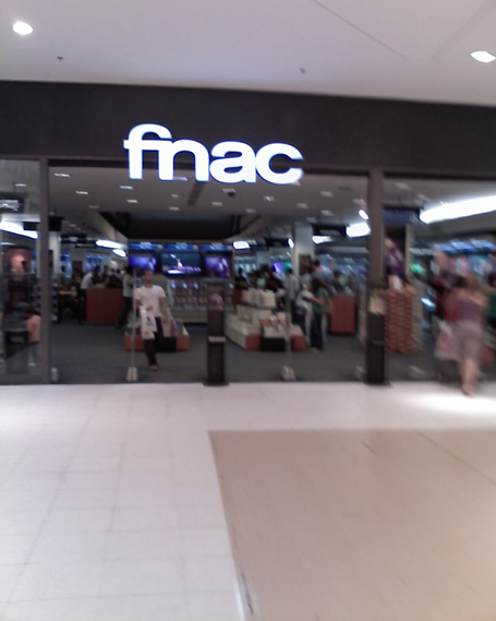 Fnac